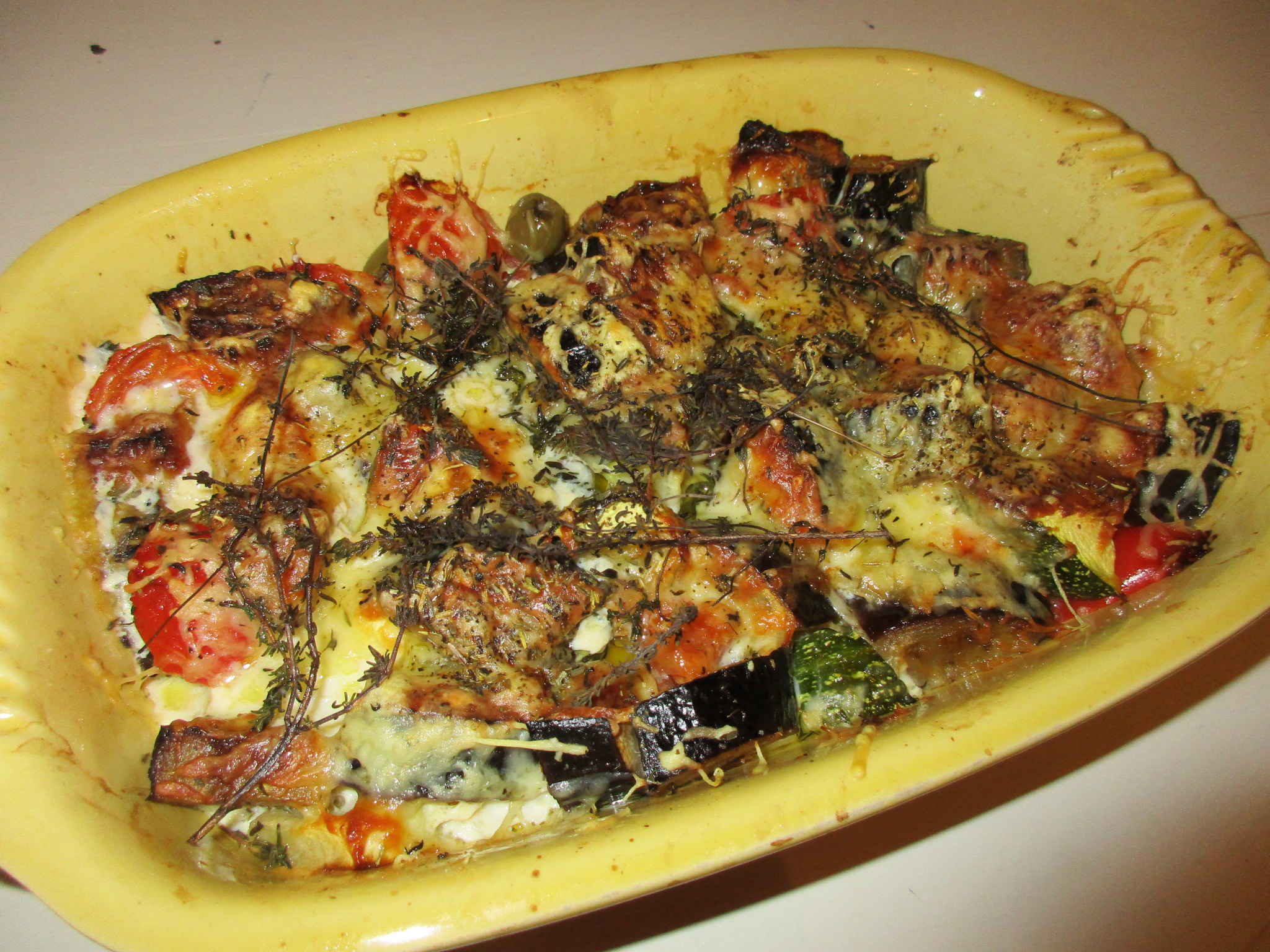 Tian provençal de légumes : aubergine, courgette, tomate, œuf, fromage, olives, tomate, thym